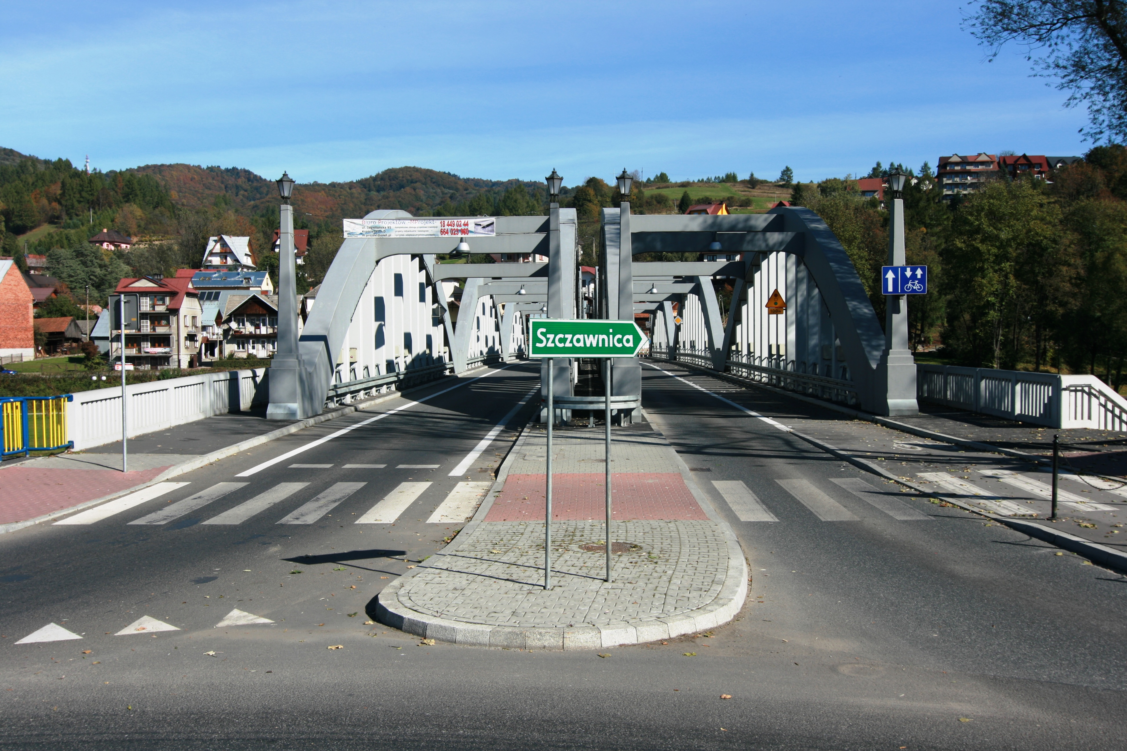 Widok z ronda w kierunku wjazdu na mosty im. Józefa Piłsudskiego nad Dunajcem w Krościenku nad Dunajcem